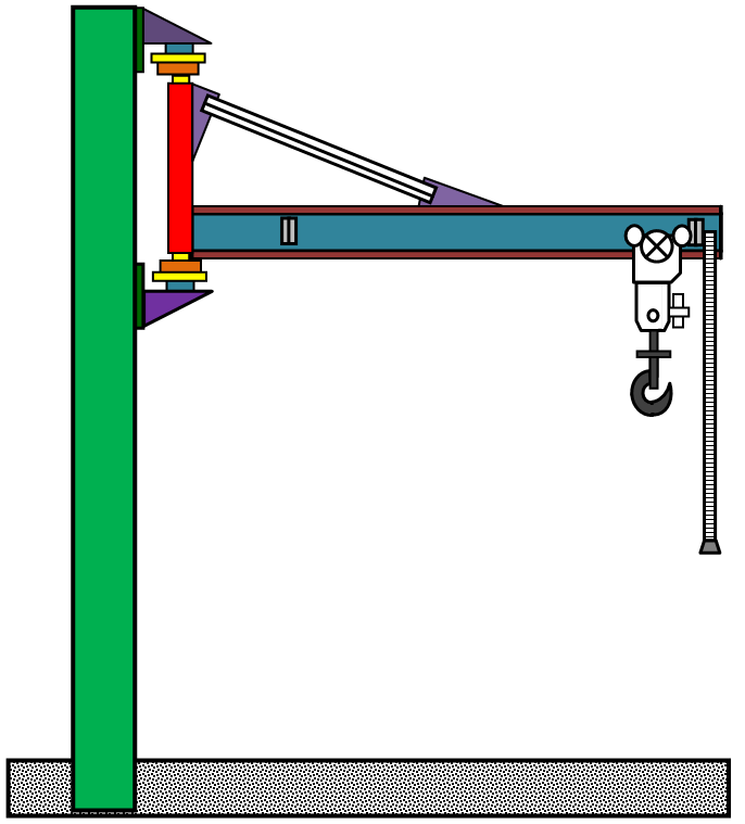 Консольный кран - настенного типа - мой чертёж